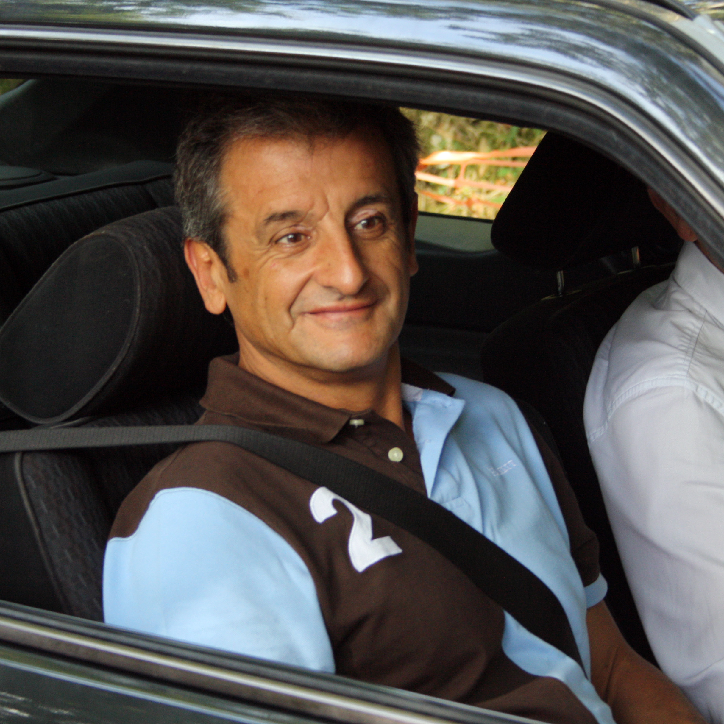 Luis Moya en 2012.